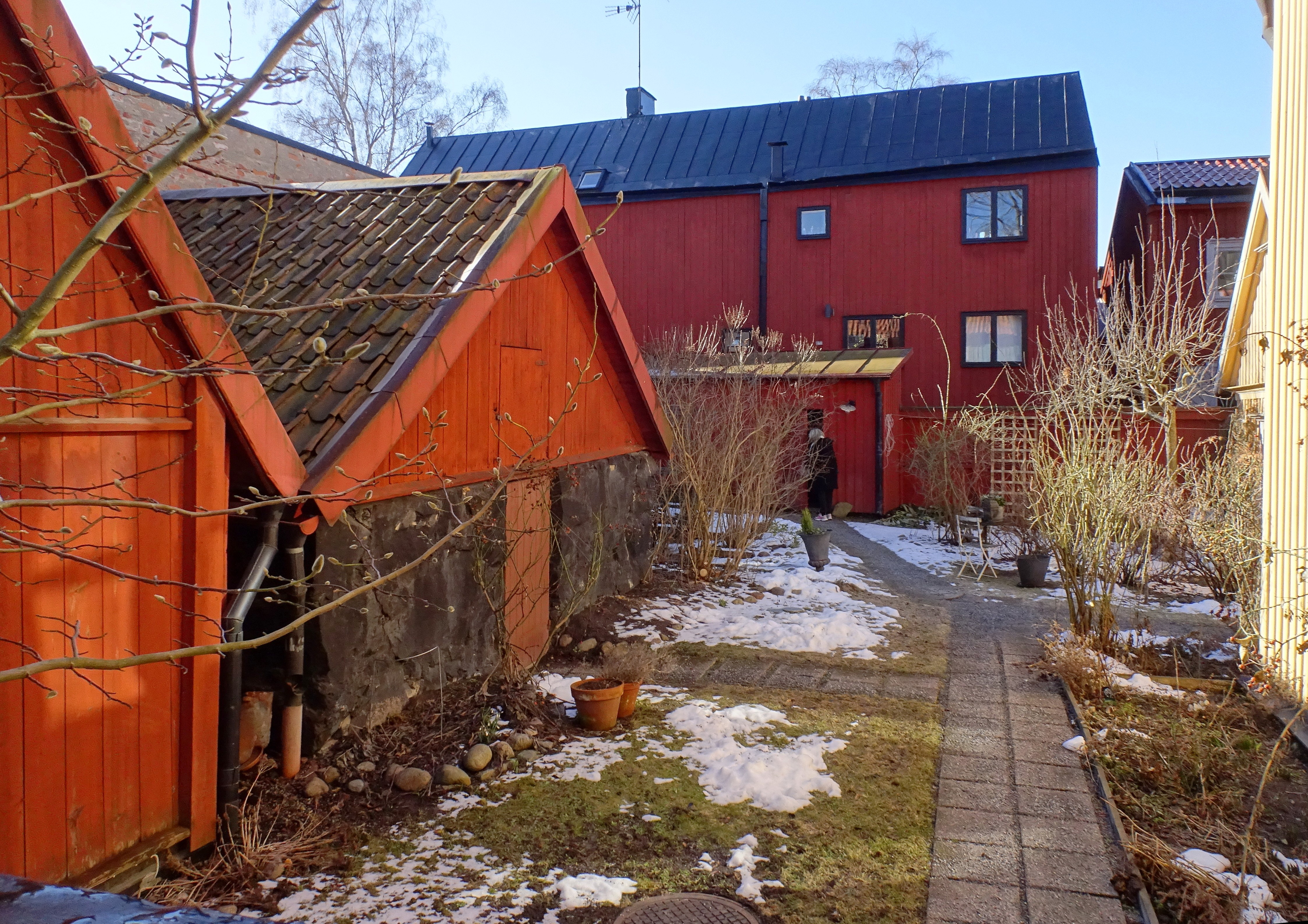 Dödsgrävarens hus, bakgården med likboden